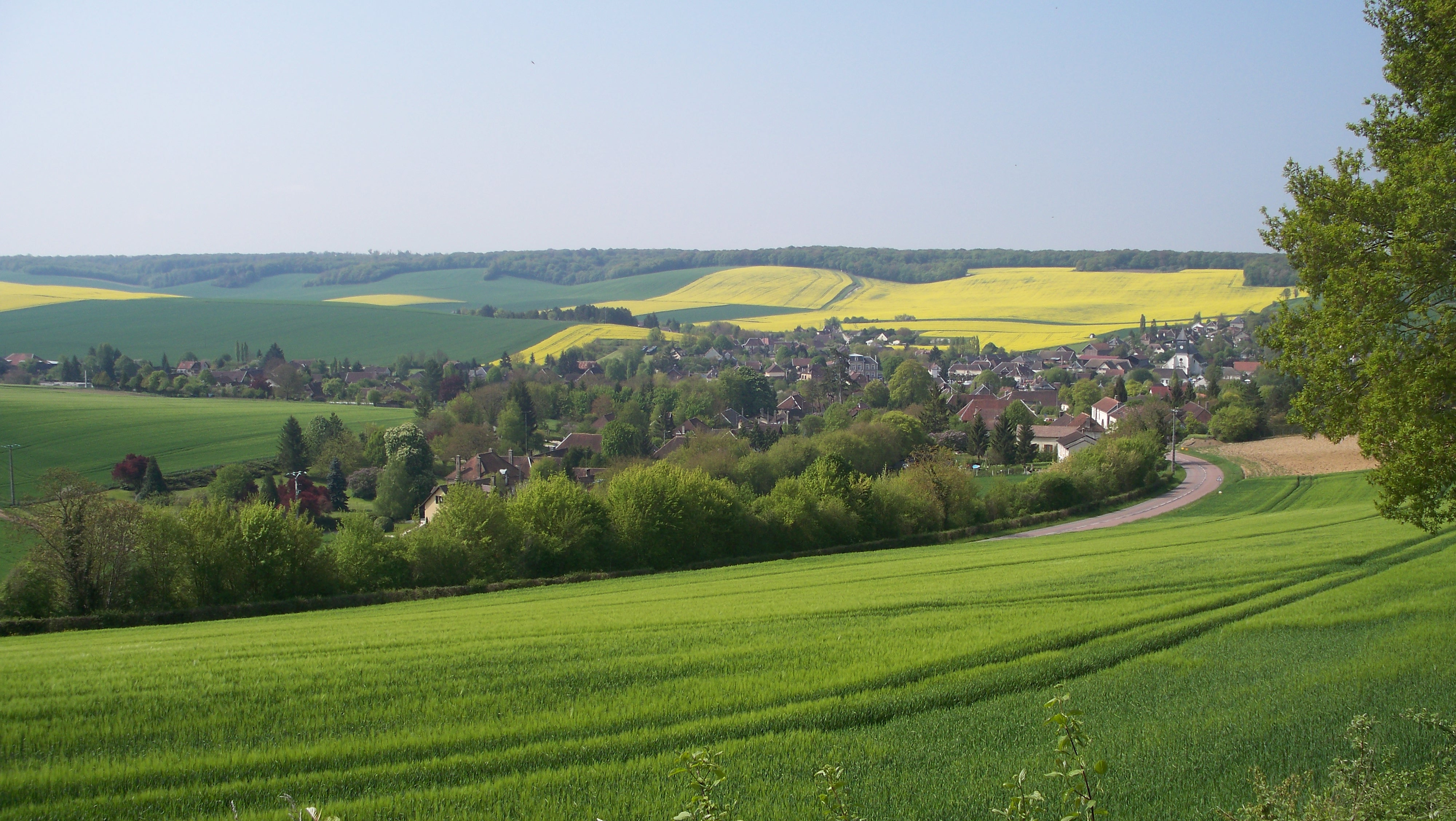 Vue d'ensemble du village de Vauchassis